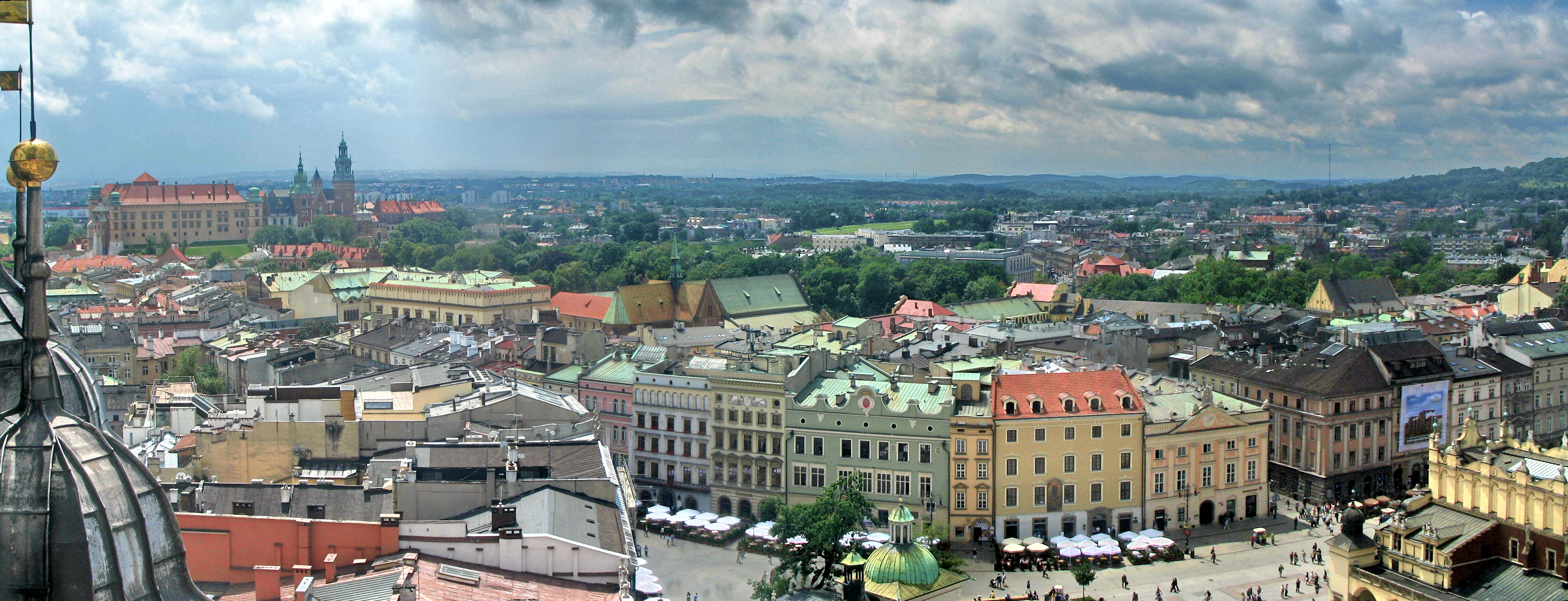 St. Mary in Kraków, Poland